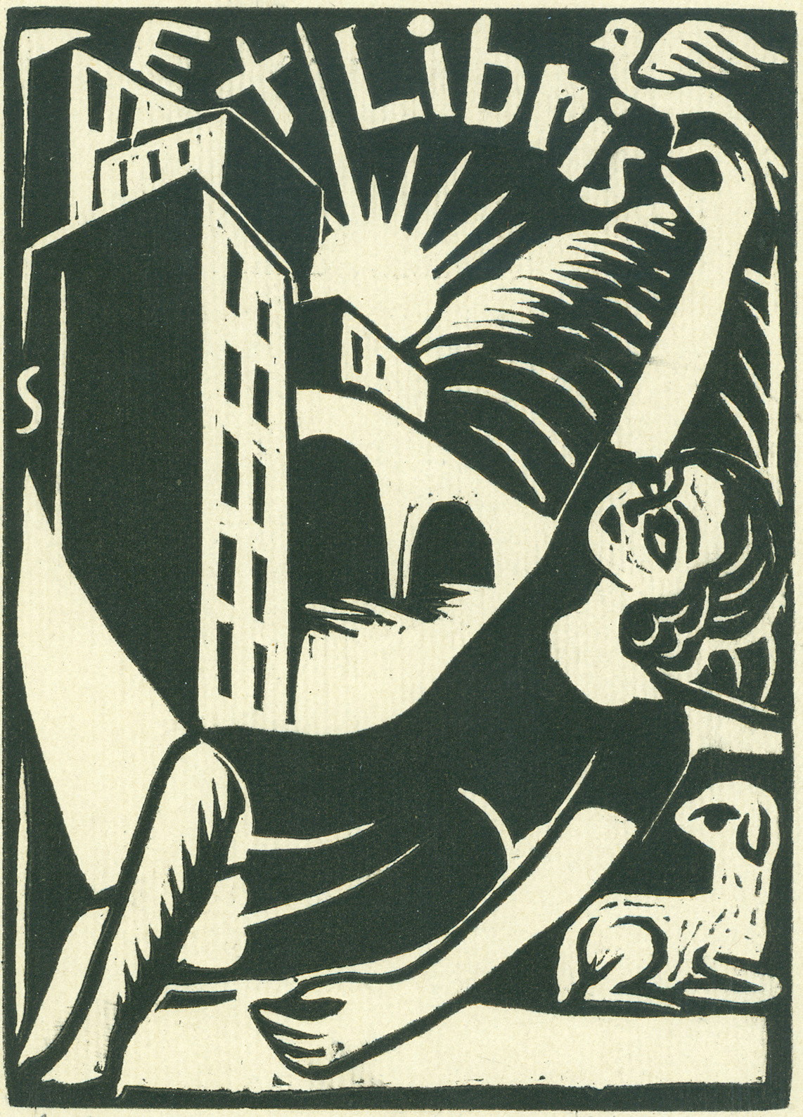 Georg Schrimpf, Exlibris. Probedruck. Höhe 13; Breite 9,5 cm (Bild)